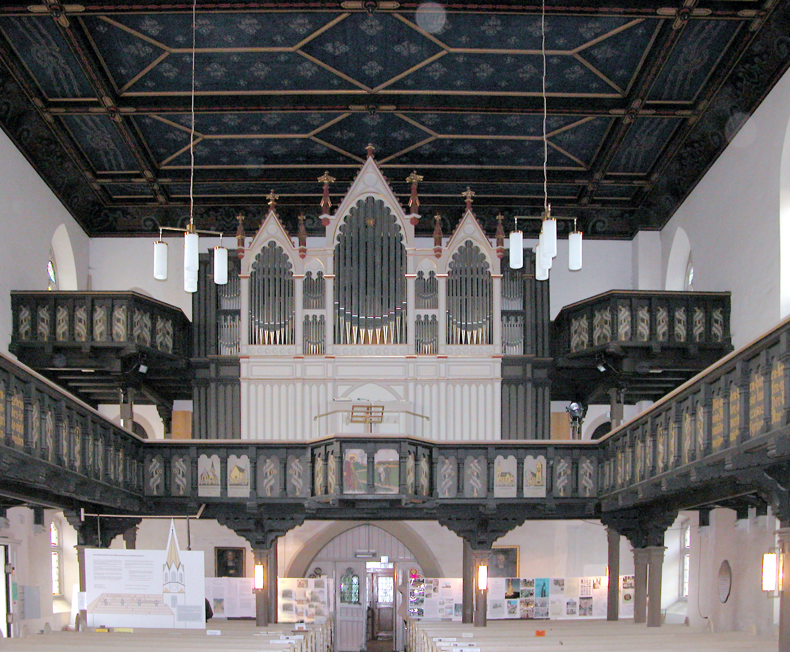 10.04.2004 01139 Dresden-Kaditz: Ev.-Luth. Emmauskirche Altkaditz (GMP: 51.083496,13.671395). Vor dem Bau der heutigen Kirche stand hier aus dem 14./15. Jh. die Laurentiuskapelle, von der im Sockelgeschoß des Turms noch ein gotisches Kreuzgewölbe mit Laurentius-Schlußstein erhalten ist. Um 1500 erfolgte ein Neubau des Kirchgebäudes als spätgotischer Saalbau mit markantem Westturm. 1750-1756 wurde das Kircheninnere barock umgestaltet. Aus dieser Zeit stammt der hölzerne Kanzelaltar mit den Aposteln Petrus und Paulus, geschaffen von Gottfried Knöffler. 1869 begann die äußerliche Erneuerung der Kirche im Stil der Neogotik durch die Gebrüder Ziller. Das Innere wurde von ihnen 1887/1888 neugotisch umgestaltet. Die Orgel wurde 1991 von der Firma Jehmlich Orgelbau Dresden neu in den alten neugotischen Prospekt von 1888 eingebaut. Das Instrument ist mechanisch und hat auf 2 Manualen und Pedal 19 klingende Stimmen (ca. 1300 Pfeifen). [DSCN2739.TIF]20040410940DR.JPG(c)Blobelt